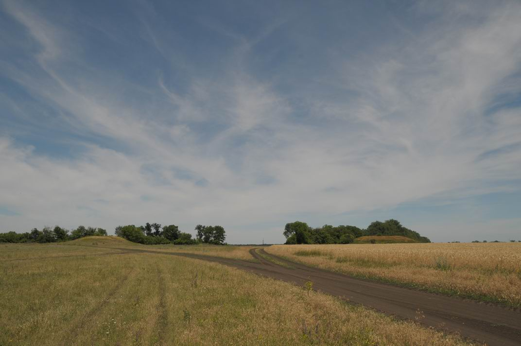 Кургани поблизу с.Садове Близнюківського району